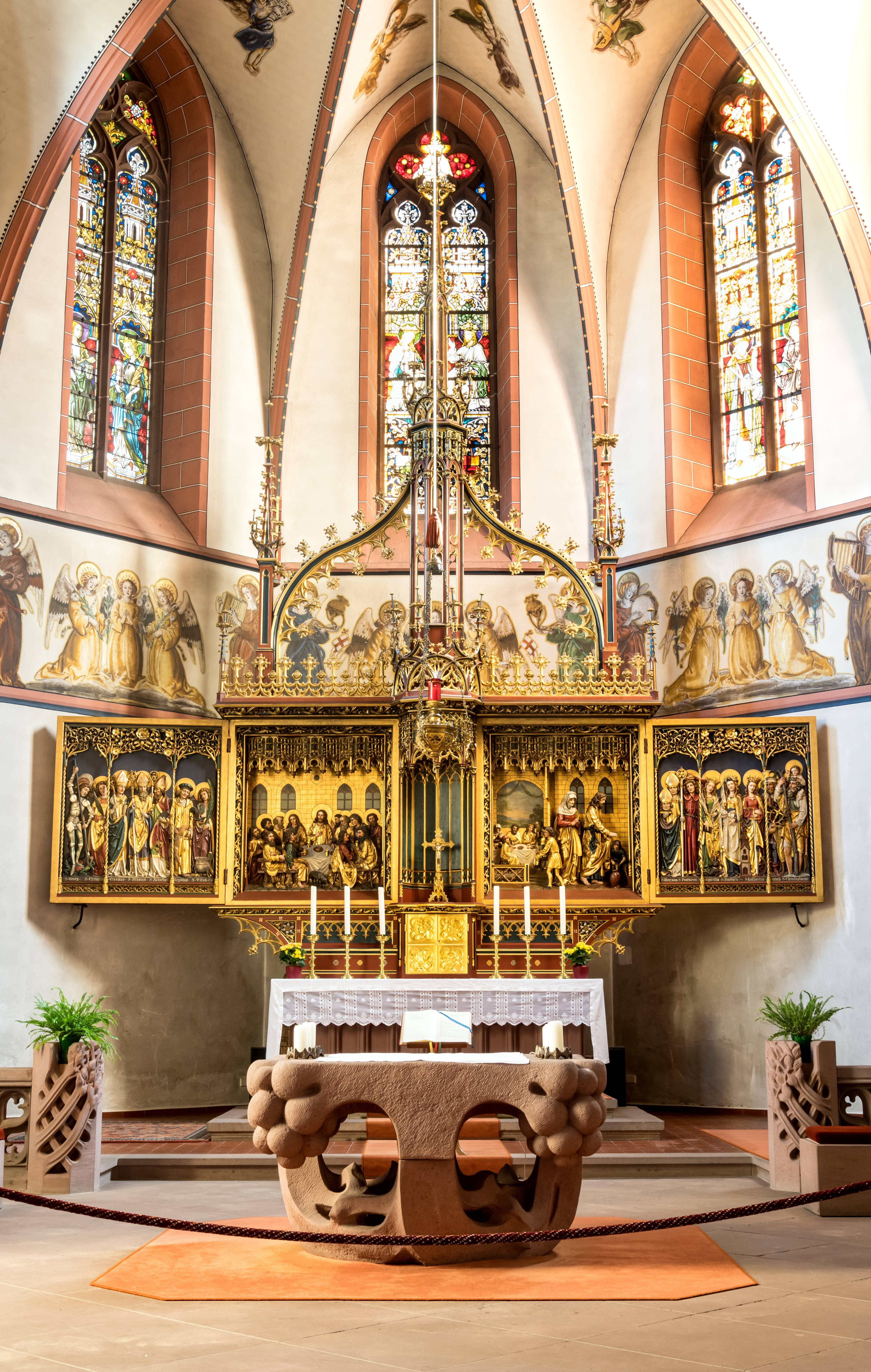 Die katholische Kirche St. Blasius im Glottertal Chor und Hauptaltar